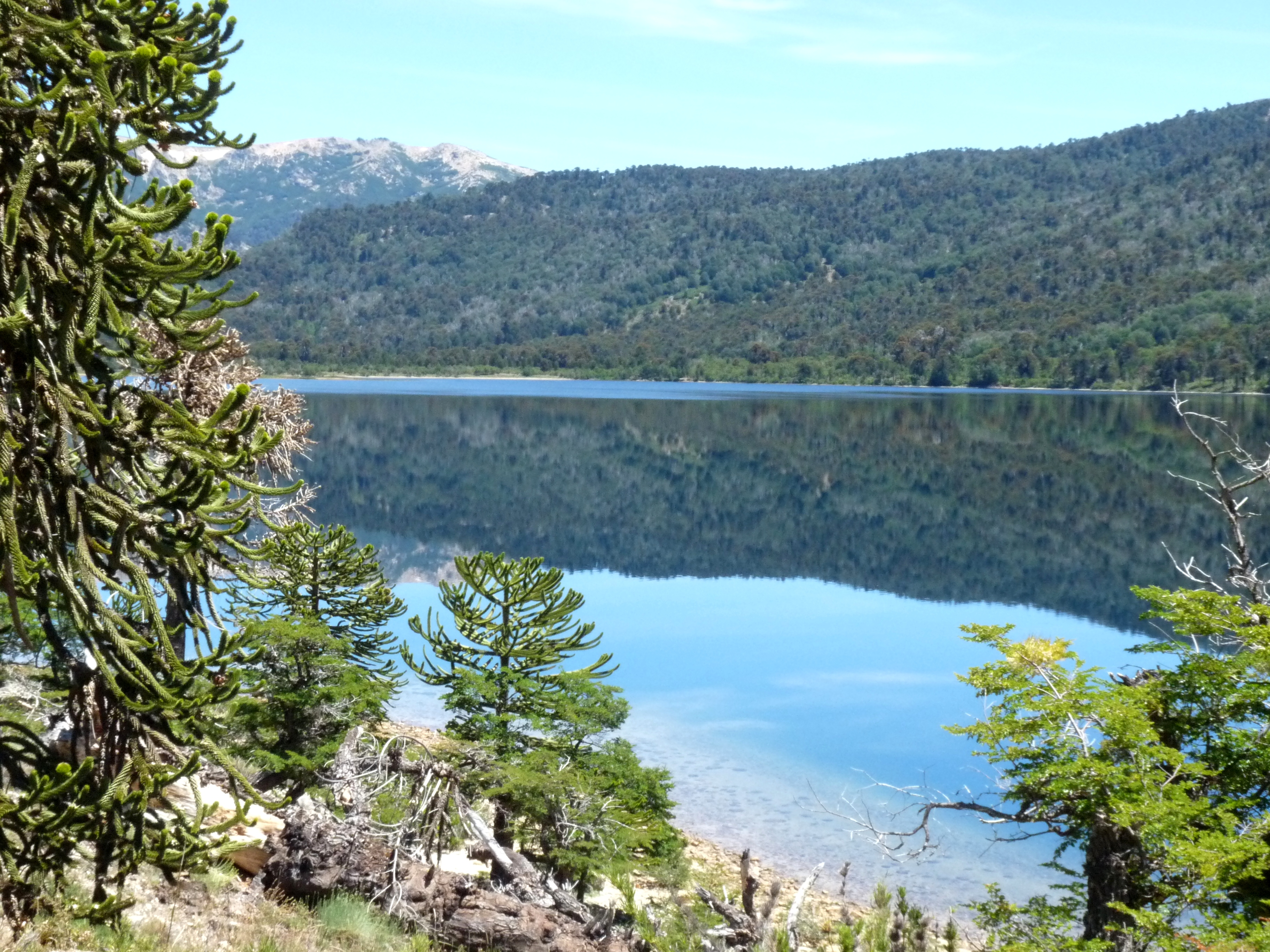 Recorriendo la comunidad Mapuche de Ruca Choroi